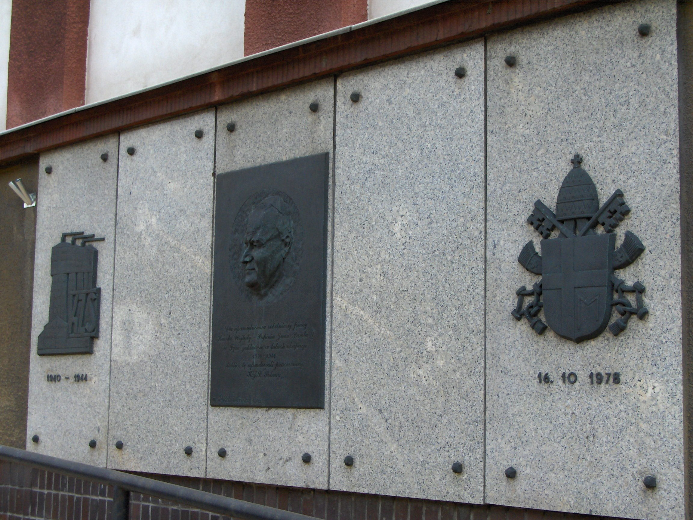 Tablica pamiątkowa ku czci robotniczej pracy Karola Wojtyły w Krakowskich Zakładach Sodowych Solvay . Tablica znajduje się na budynku obecnego Centrum Sztuki Solvay przy ulicy Zakopiańskiej 62 , Kraków .